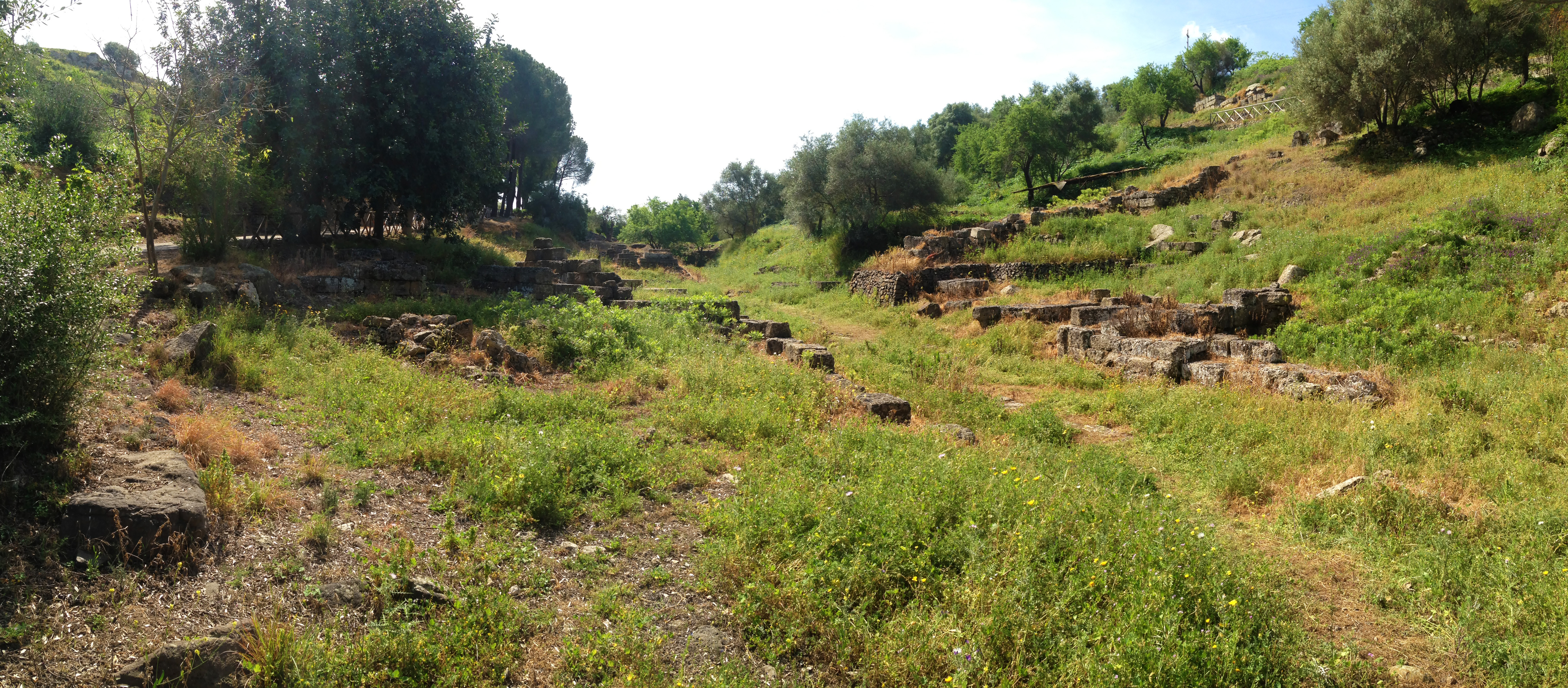 Ingresso sud di Leontinoi con porta a tenaglia